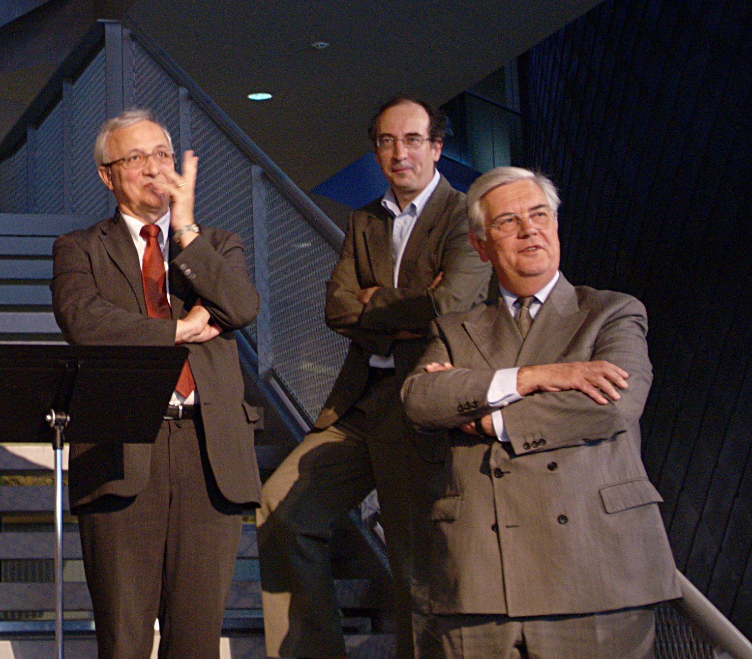 Daniel Delaveau, maire de Rennes, Philippe Hamon, professeur d'histoire à l'Université Rennes 2, et François Erlenbach, directeur régional des affaires culturelles de Bretagne lors de l'inauguration de l'exposition « Les Bretons et l'Argent » au musée de Bretagne le 12 mai 2011.